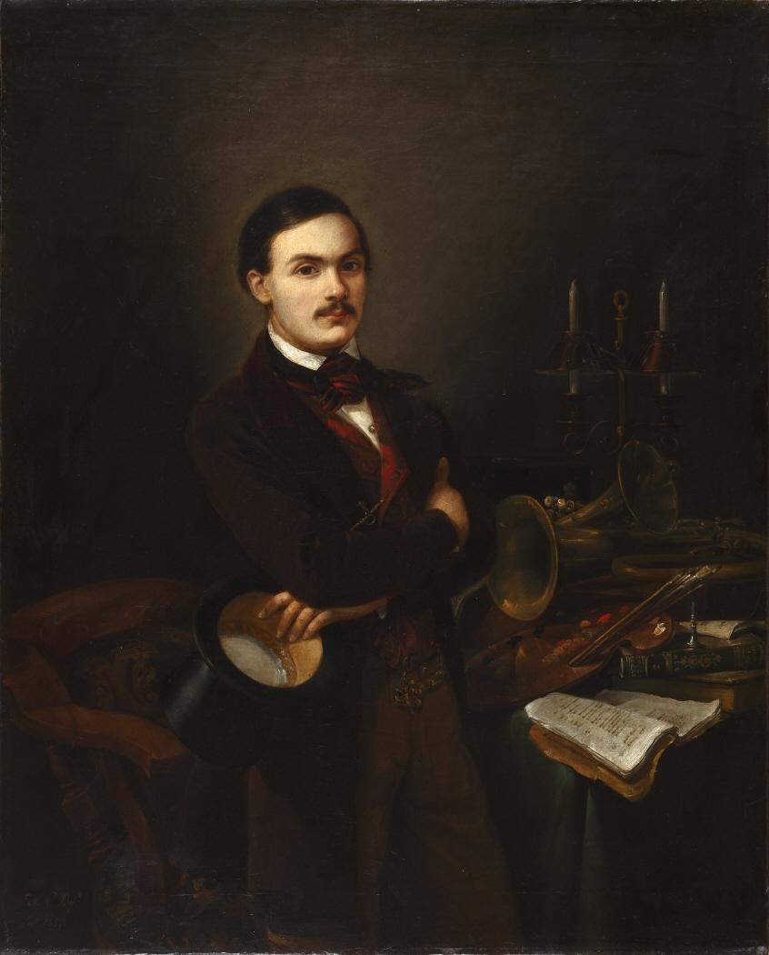 Autorretrato del pintor español Manuel Cabral Aguado-Bejarano (1827-1891), que nació y murió en Sevilla.